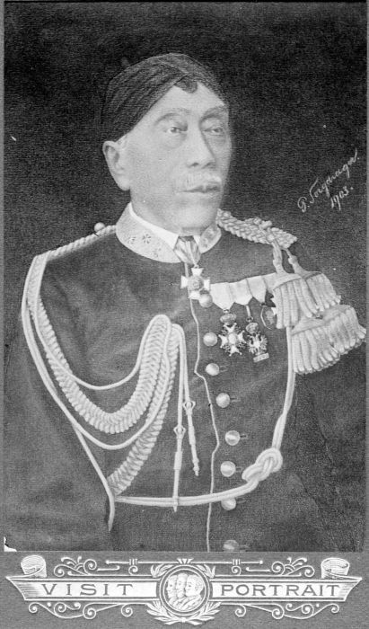 KGPAA Mangkunegara IV, memerintah Mangkunegaran dari 1853 hingga 1881